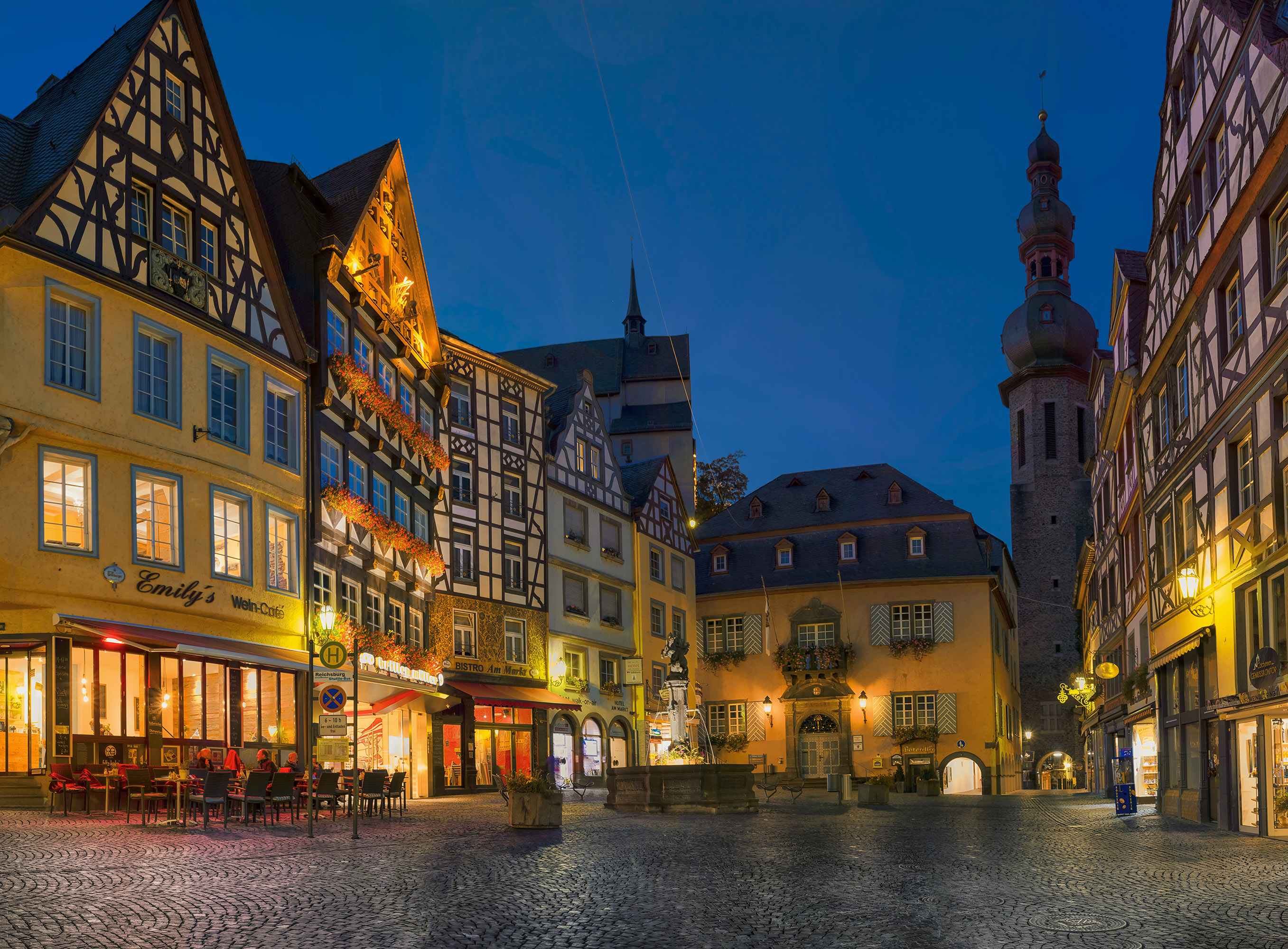 Der Marktplatz in Cochem in der Abenddämmerung.